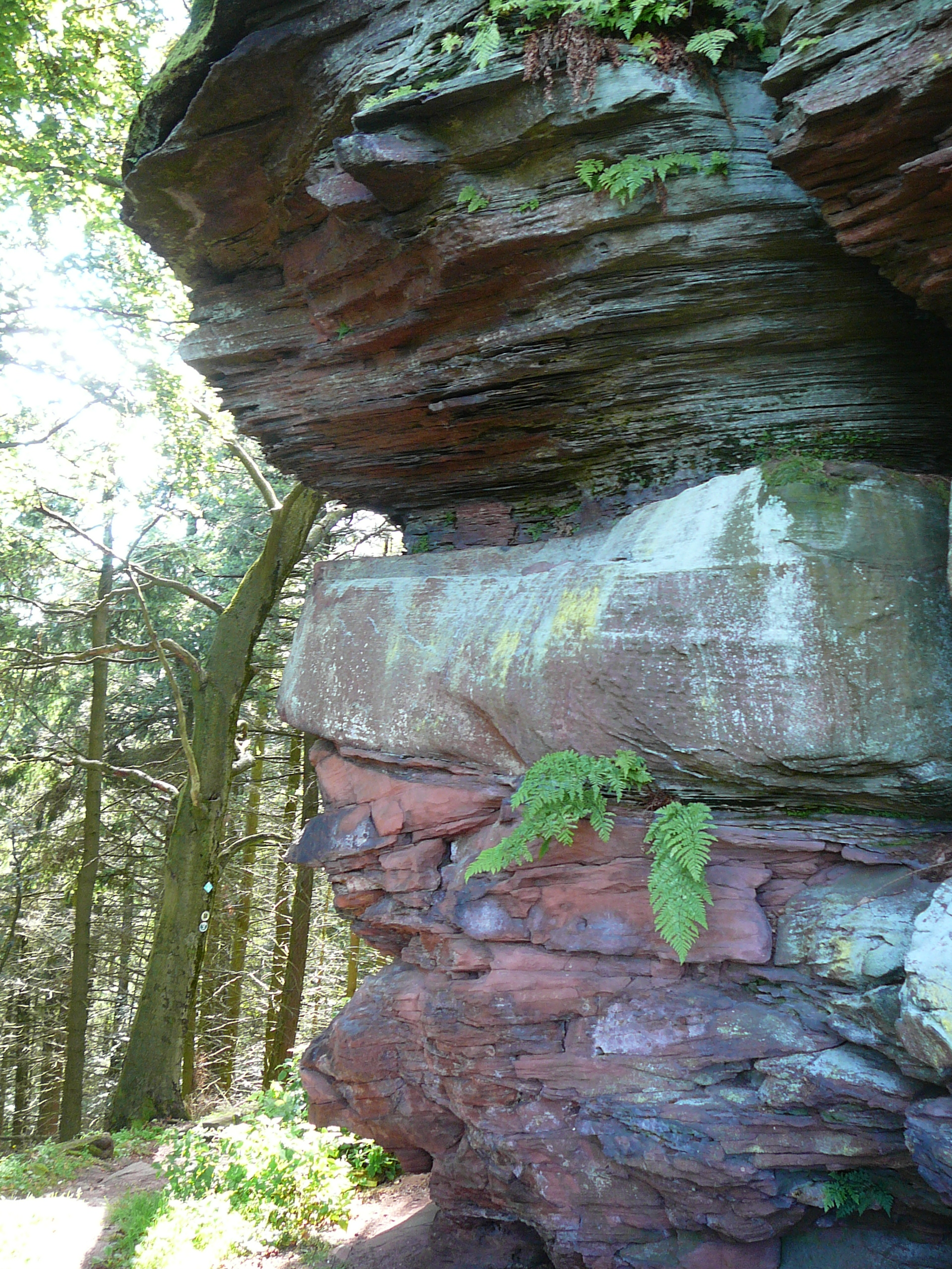 Gipfelregion des Rehbergs: Gesteinsformationen der Rehbergschicht